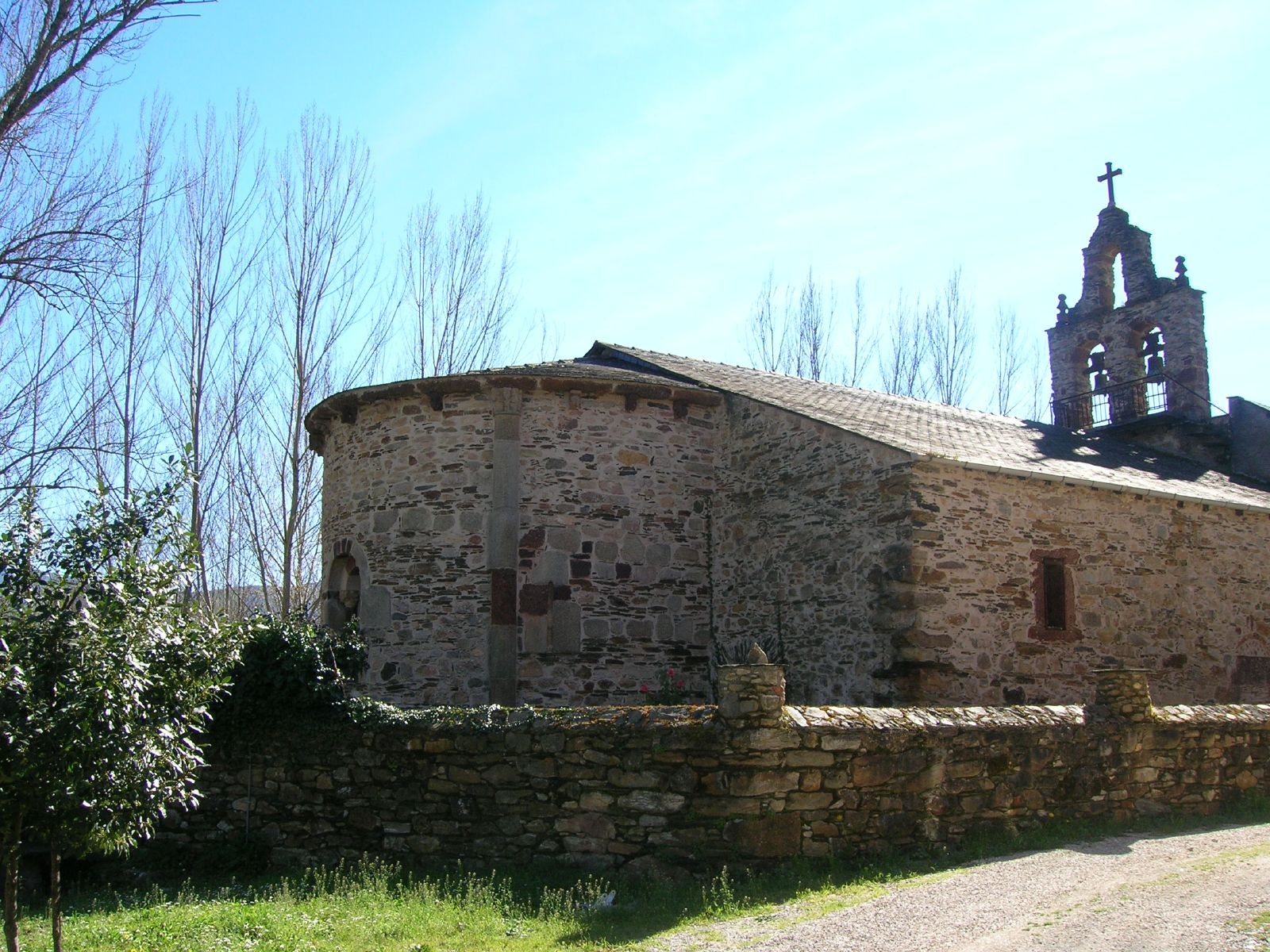 Monasterio de San Miguel de XagoazaMonasterio de San Miguel de Xagoaza